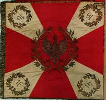 Sztandar 16 Pułku Piechoty Ziemi Tarnowskiej (strona prawa)